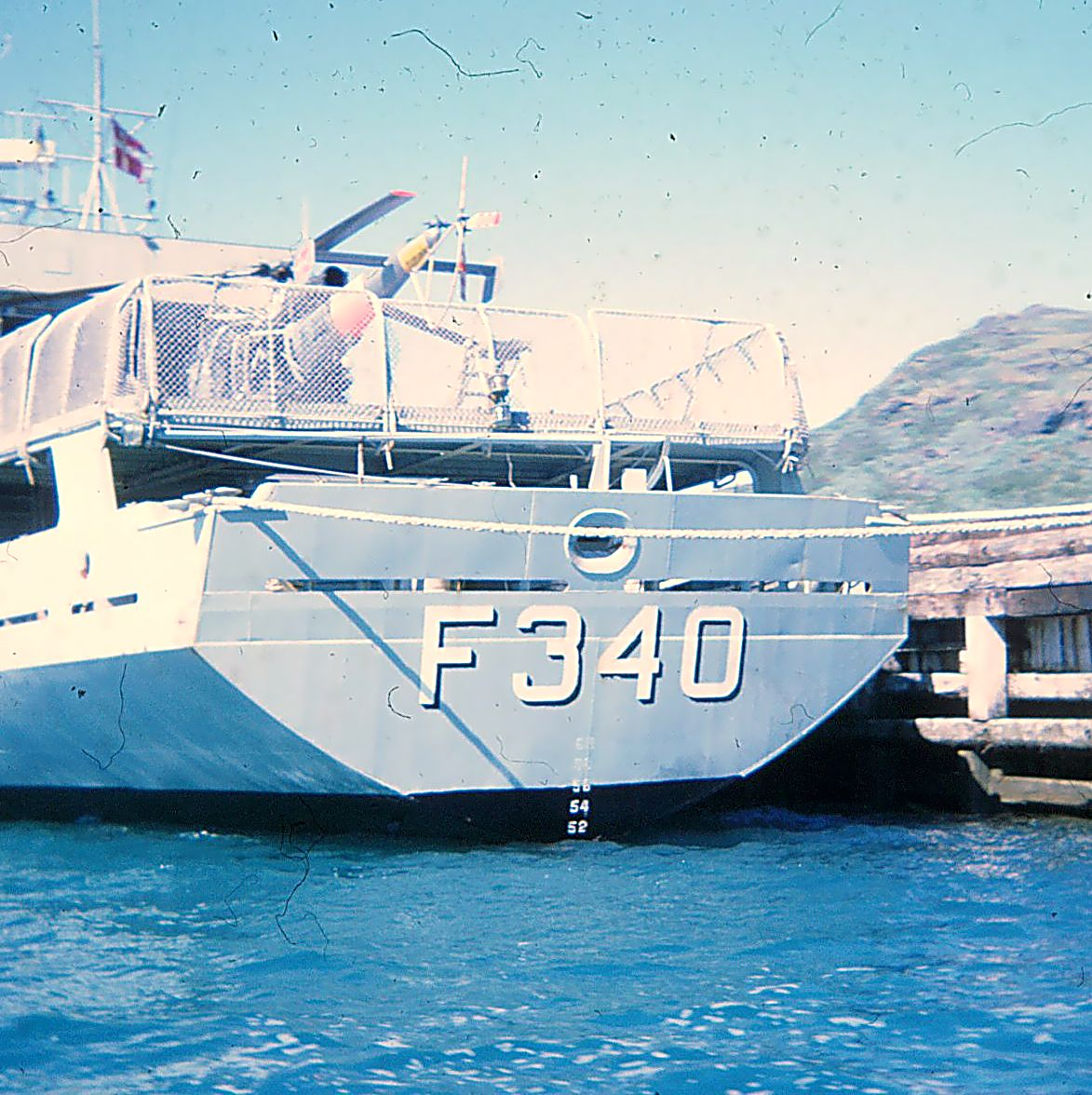 Beskytteren i Narssarssuak, Grønland. Maj 1977